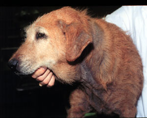 veterinary medical/dermatology